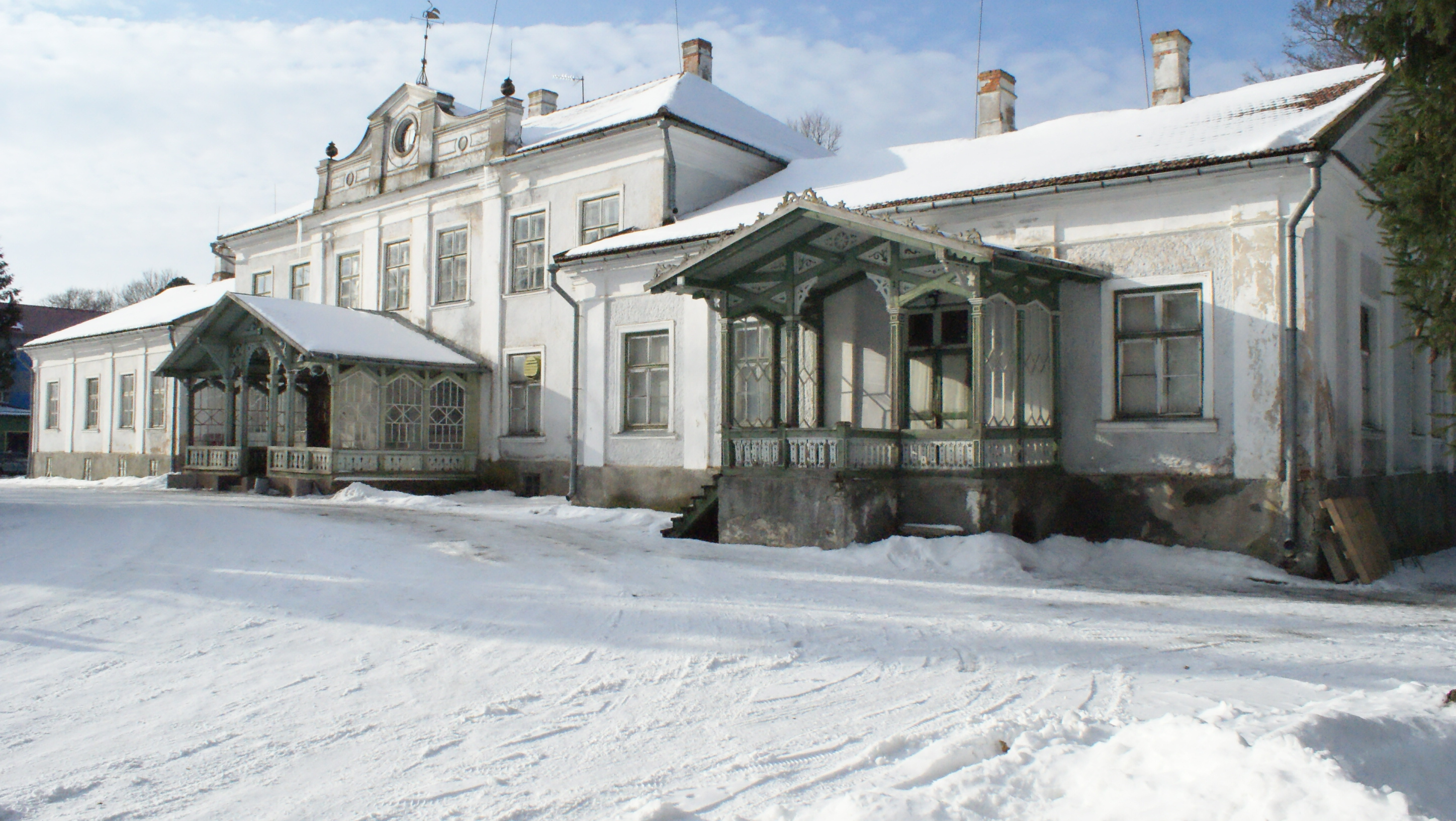 Aa mõisa peahoone